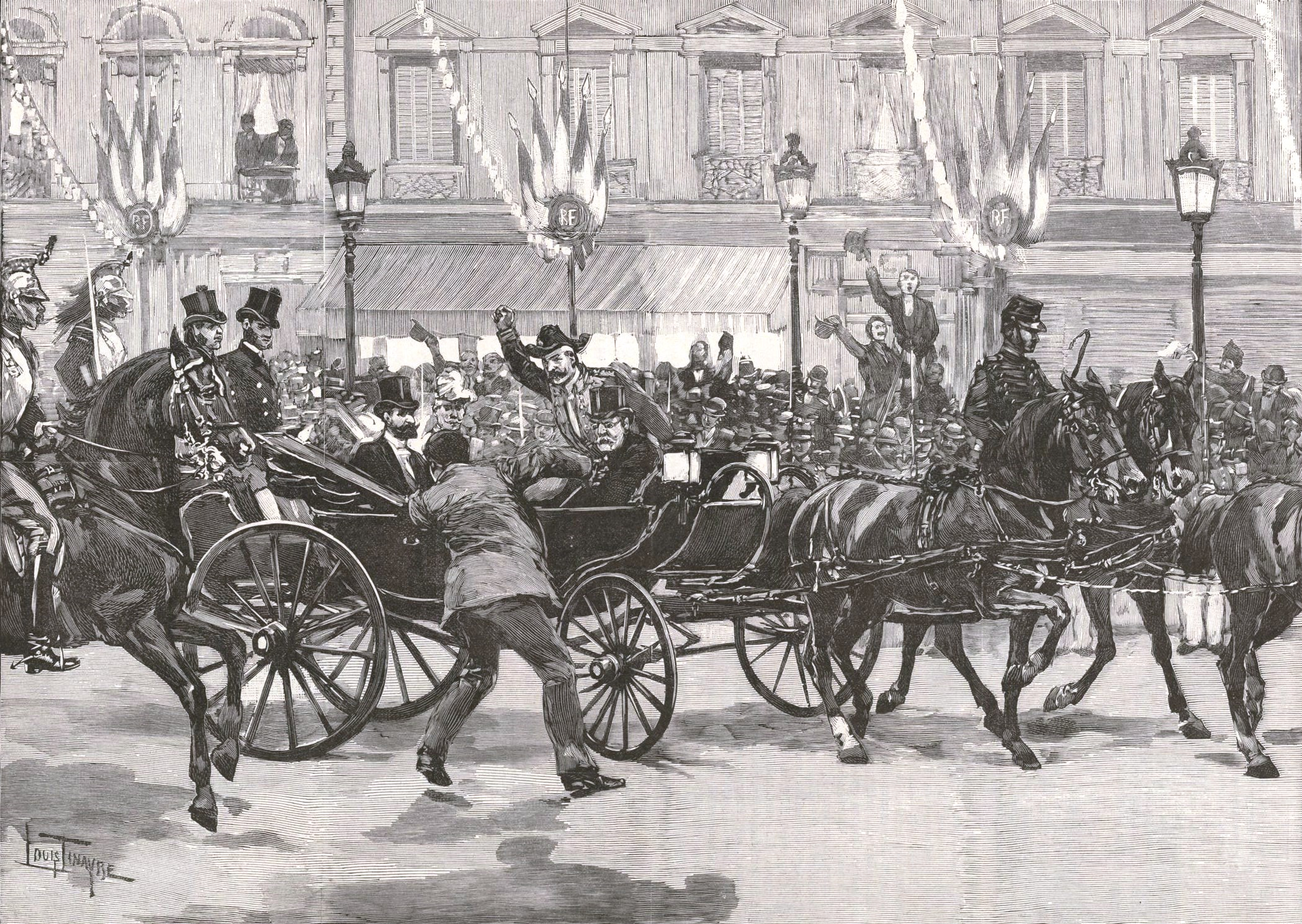 "Lyon. Assassinat du président de la République."La calèche huit-ressorts, du carrossier Ehrler est conservée au Musée automobile à Rochetaille-sur-Saône, France.